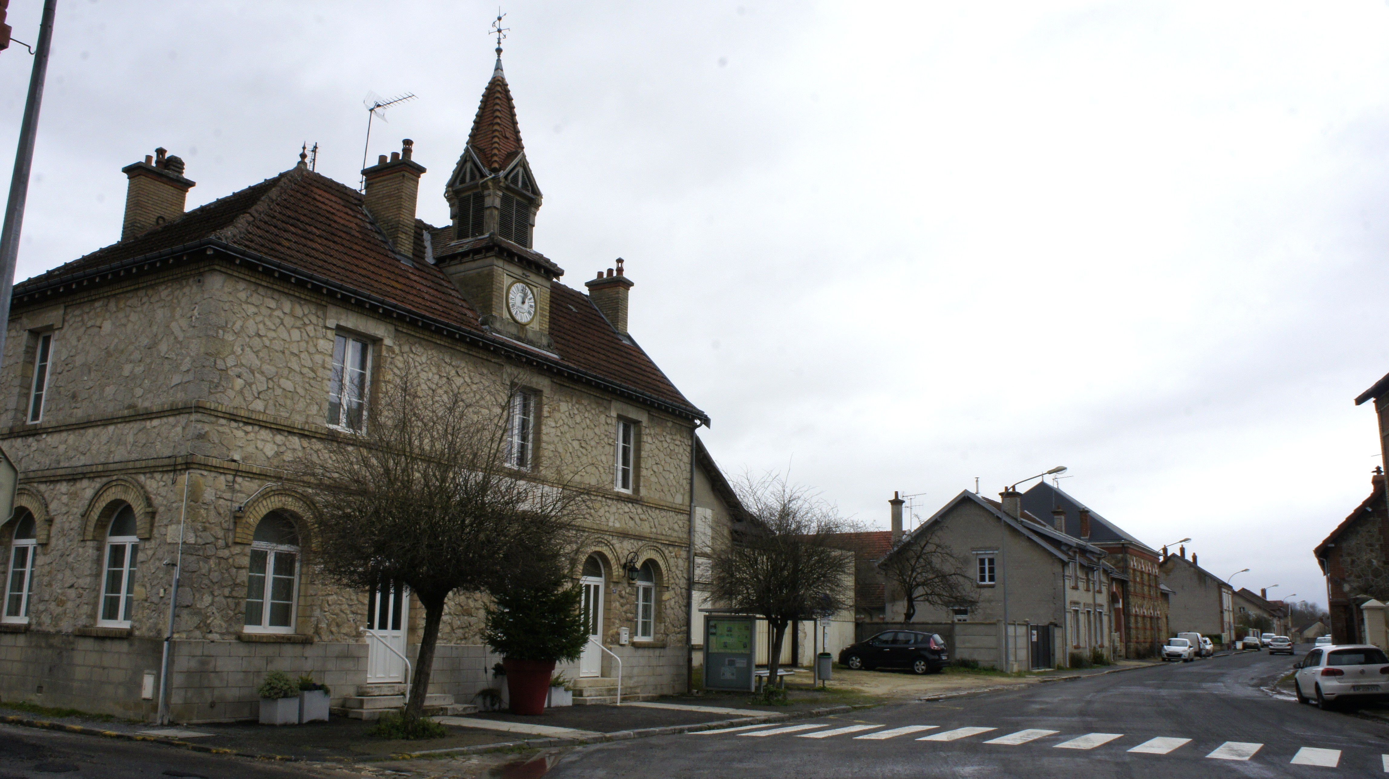 Mairie d'Auménancourt_le_Grand .